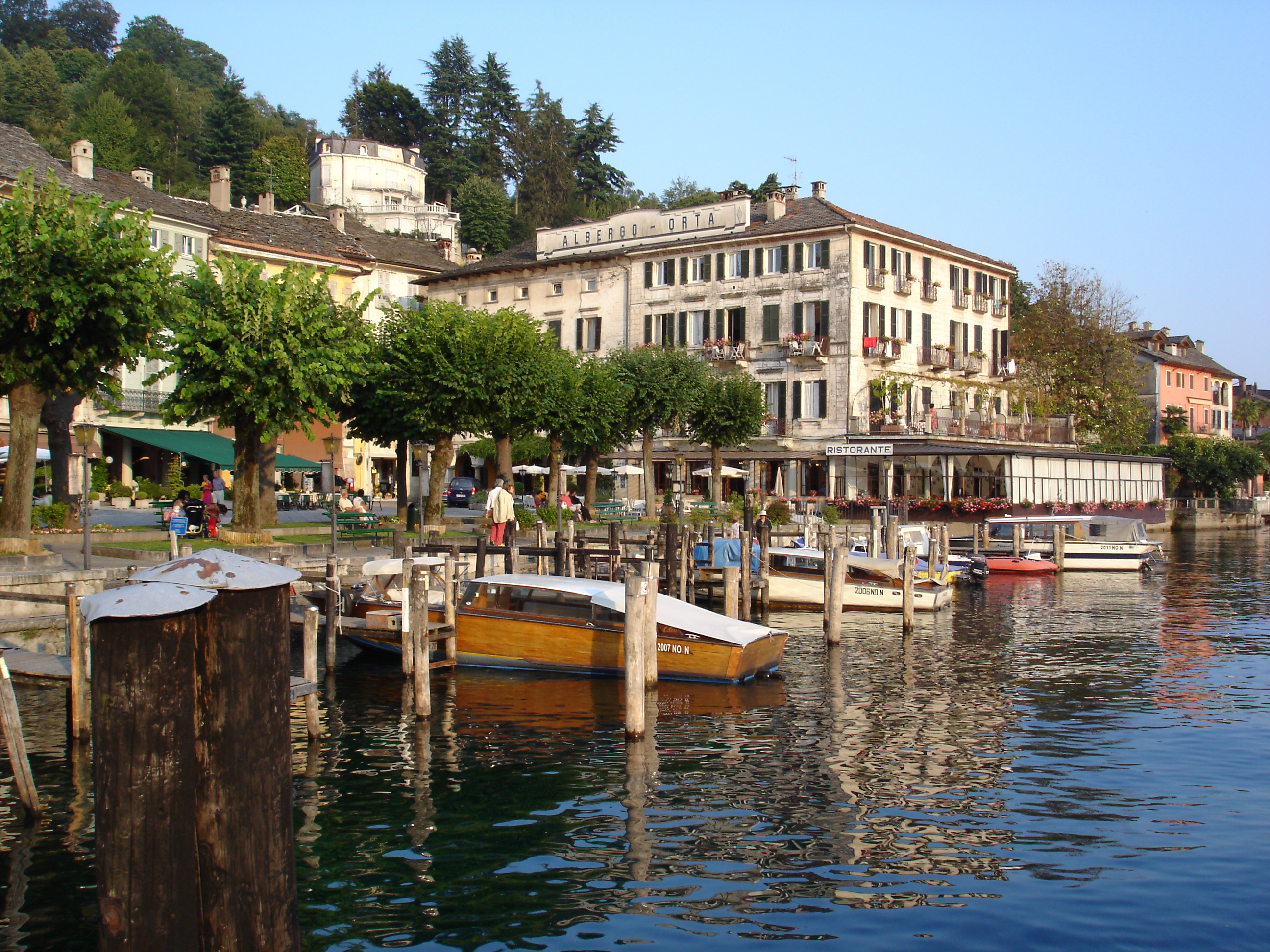 zelf gemaakte foto van plein van dorpje Orta bij het Ortameer, 21 juli 2004